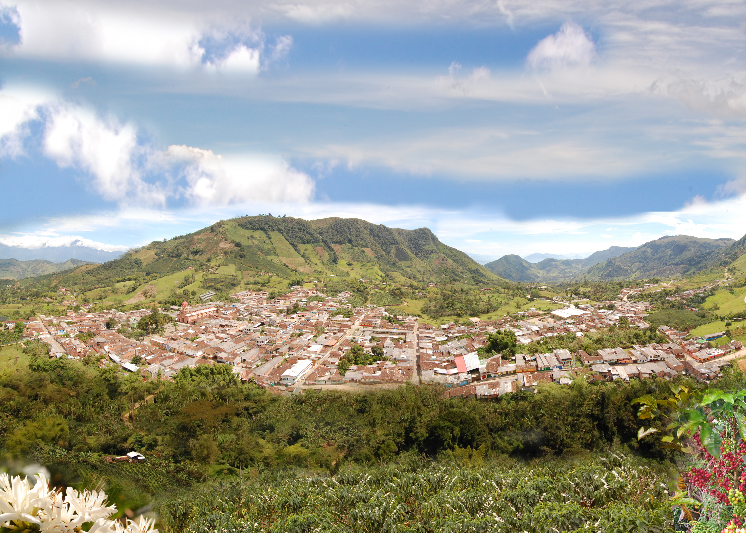 panoramica del municipio Foto Omar Obando Gallego